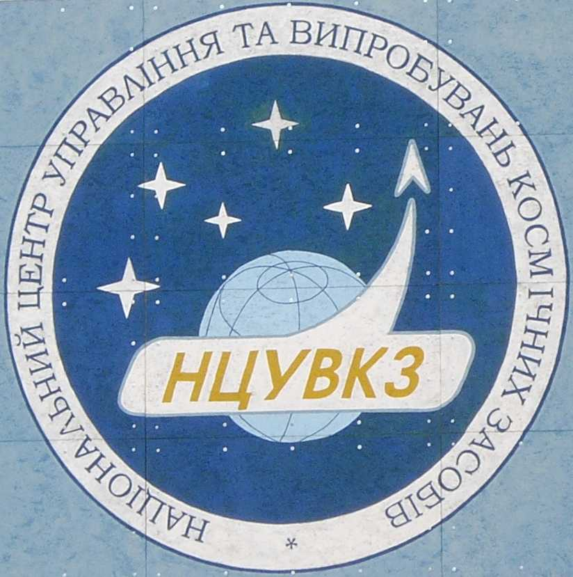 Стена заброшенного дома (первая гостиница ЦДКС). Национальный центр управления и испытаний космических средств.